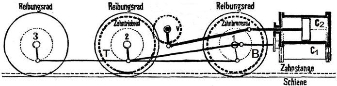 Dampflokomotiven mit dem System Winterthur werden auf den Zahnstangenabschnitten als Verbundlokomotiven betrieben. Die Hochdruckzylinder C1 treiben die Reibungsachse 2 an, die mit den Achsen 1 und 3 gekuppelt ist. Das drehbar auf die Reibungsachse sitzende Triebzahnrad T wird durch die Niederdruckzylinder C1 durch das Übersetzungszahnrad v angetrieben. Im reinen Adhäsionsbetrieb arbeiten die Maschine mit einfacher Dampfdehnung.